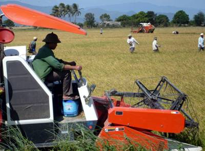 Nông nghiệp Nha Hố